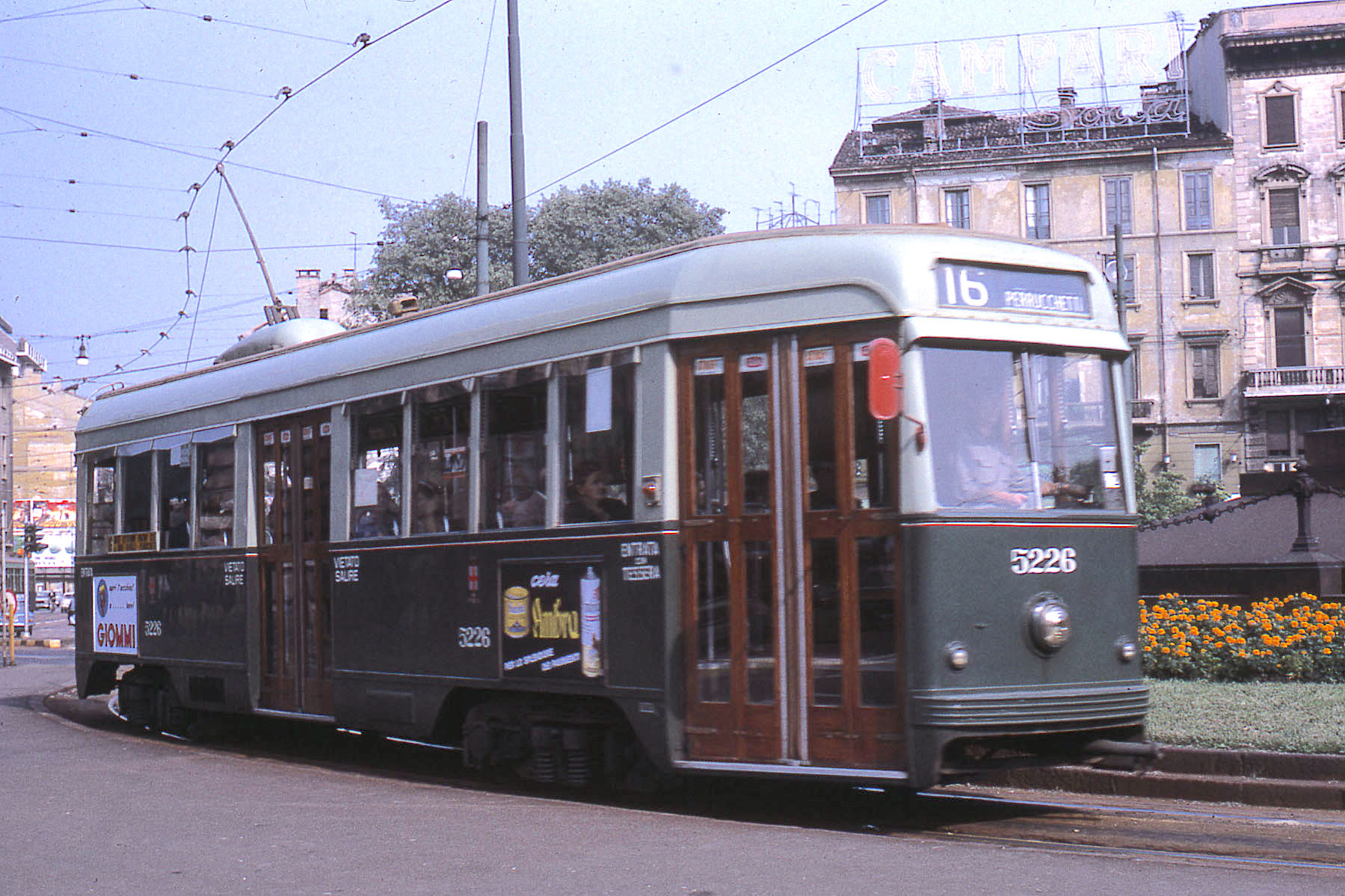 Vettura tranviaria 5226 dell'ATM di Milano in transito in largo Cairoli